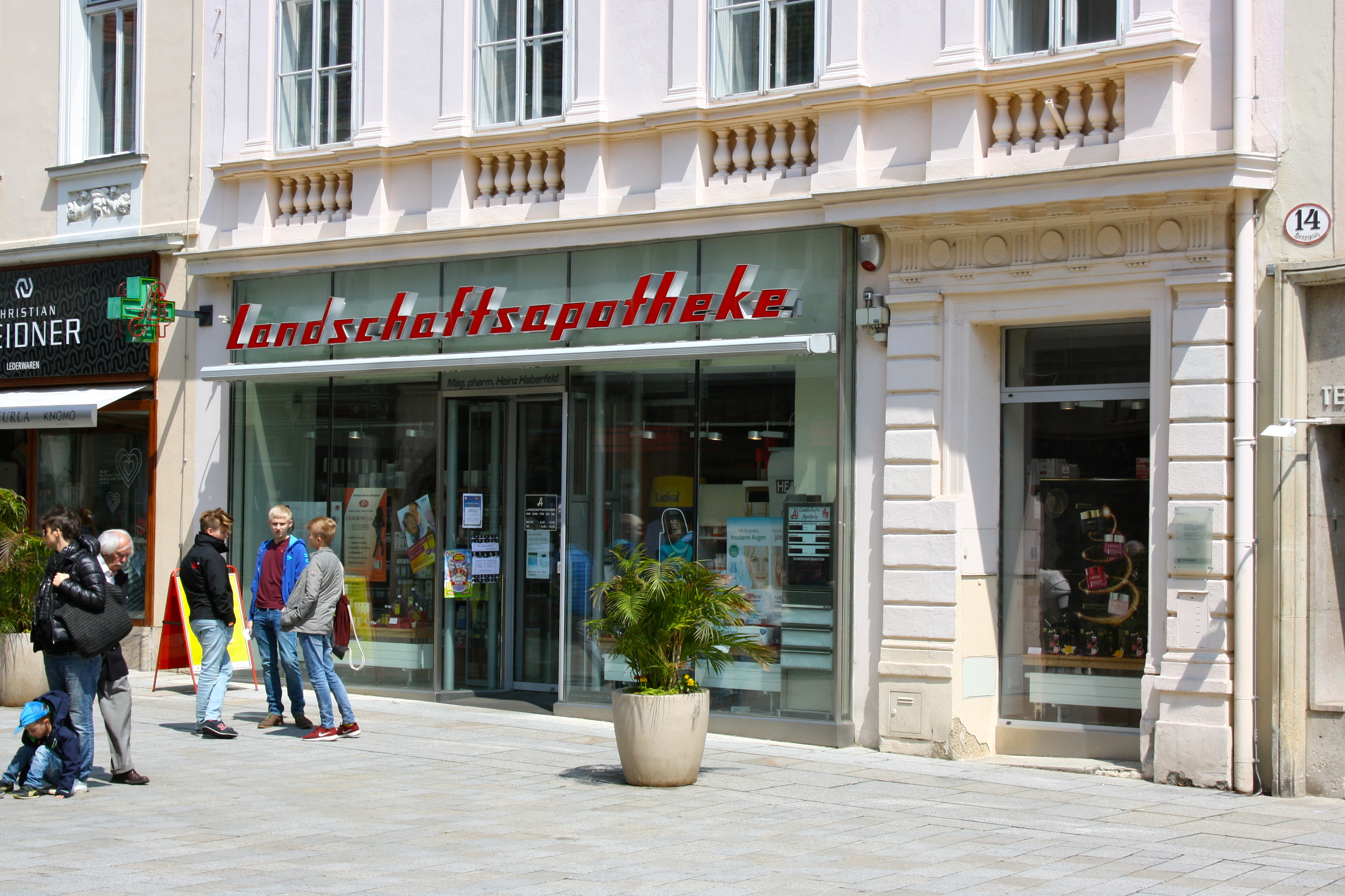 Landschaftsapotheke in Baden, Niederösterreich.